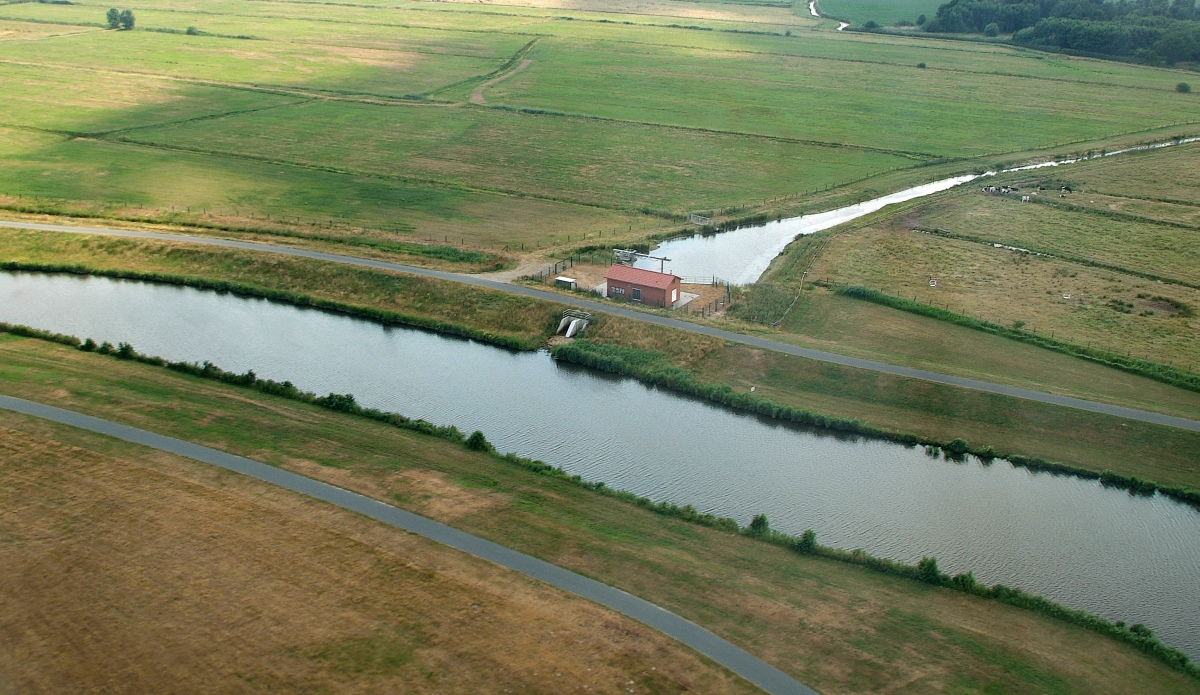 der Fluss Ochtum am Flughafen Bremen 2010